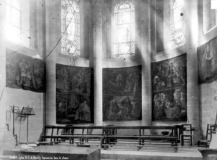 Choeur.